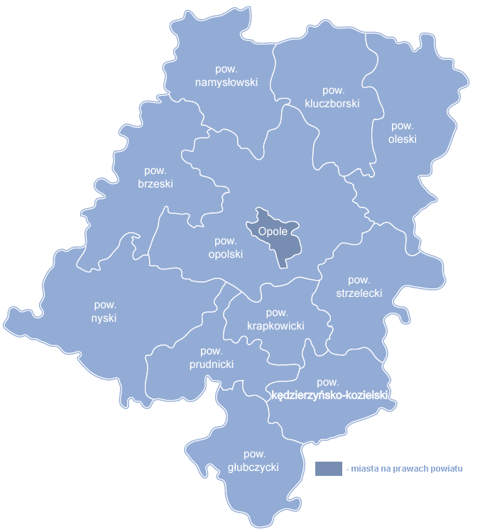 Podział administracyjny województwa opolskiego na powiaty i miasta na prawach powiatu